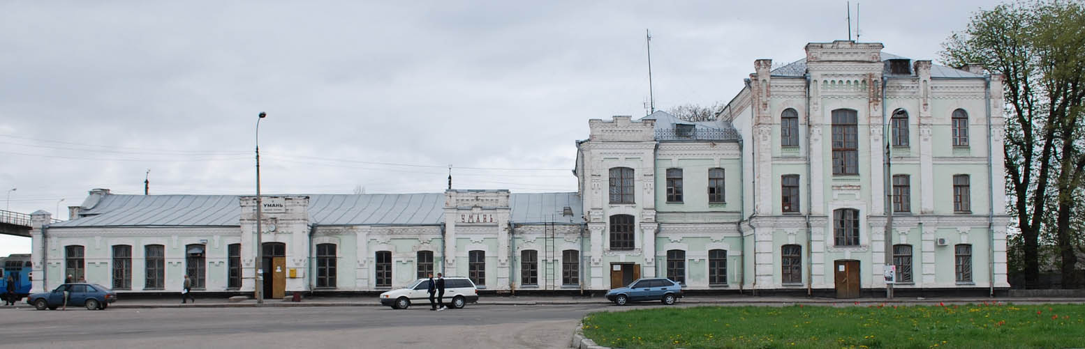 Уманський залізничний вокзал